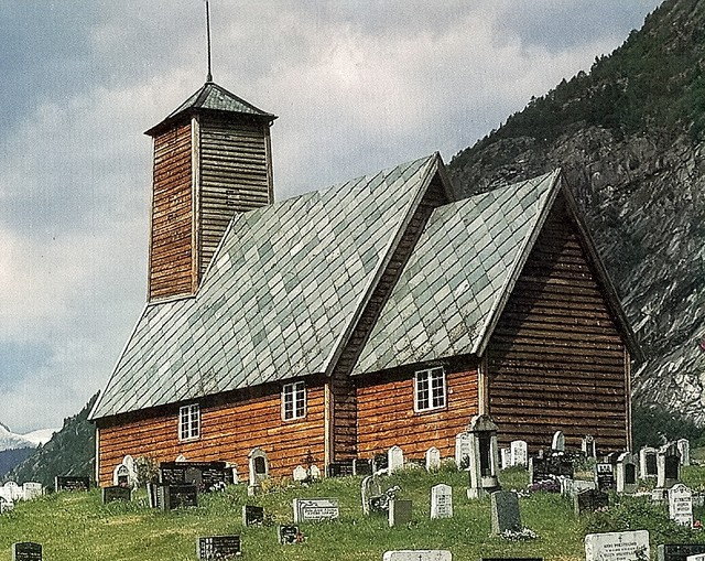 Gaupne gamle kirke